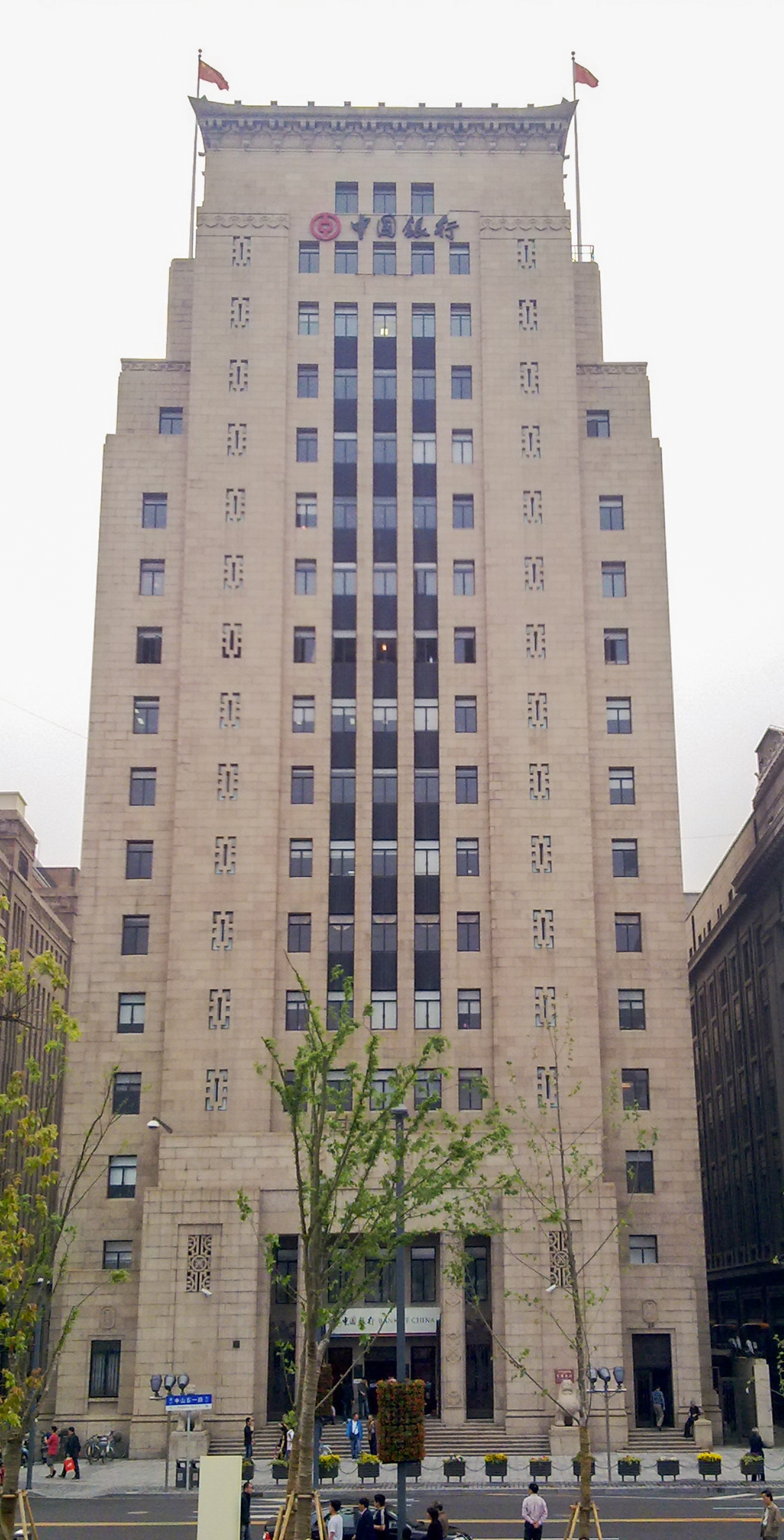 上海中国银行大楼